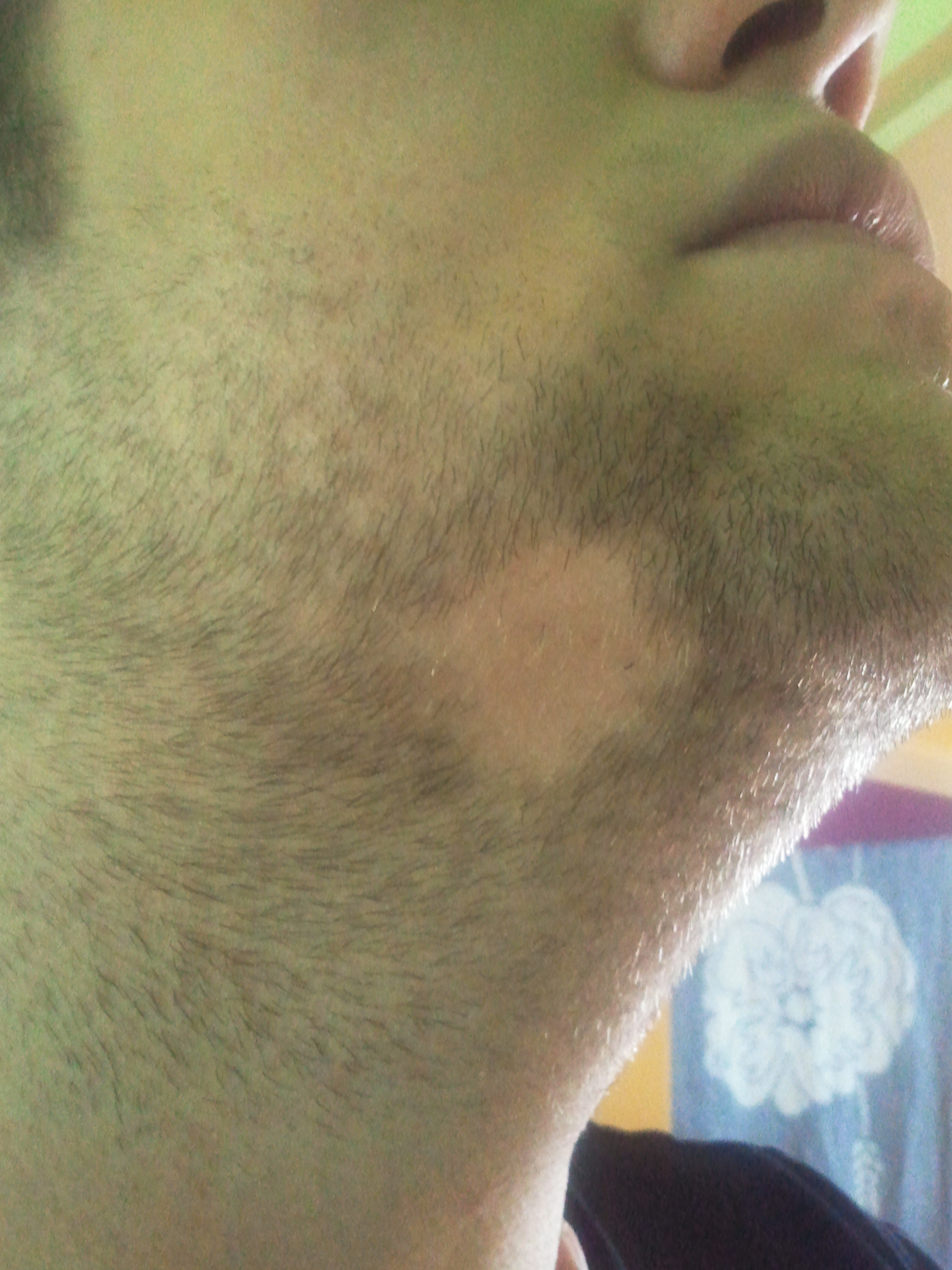 Alopecia areata (Kreisrunder Haarausfall) unter dem Kinn